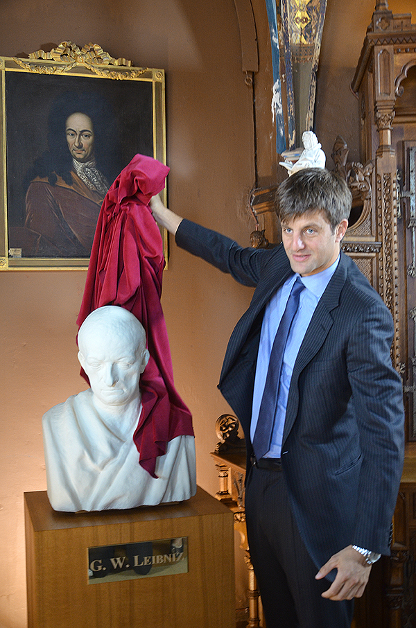 Vor einem Ölgemälde mit dem Brustbild von Gottfried Wilhelm Leibniz nach dem Maler Andreas Scheits enthüllt Ernst August von Hannover, Herr von Schloss Marienburg, während der Pressekonferenz am 12. September 2016 in der Schlossbibliothek den letzten Abguss der 1788 von dem hannoverschen Bildhauer Johann Gottfried Schmidt geschaffenen Büste des Universalgenies ...